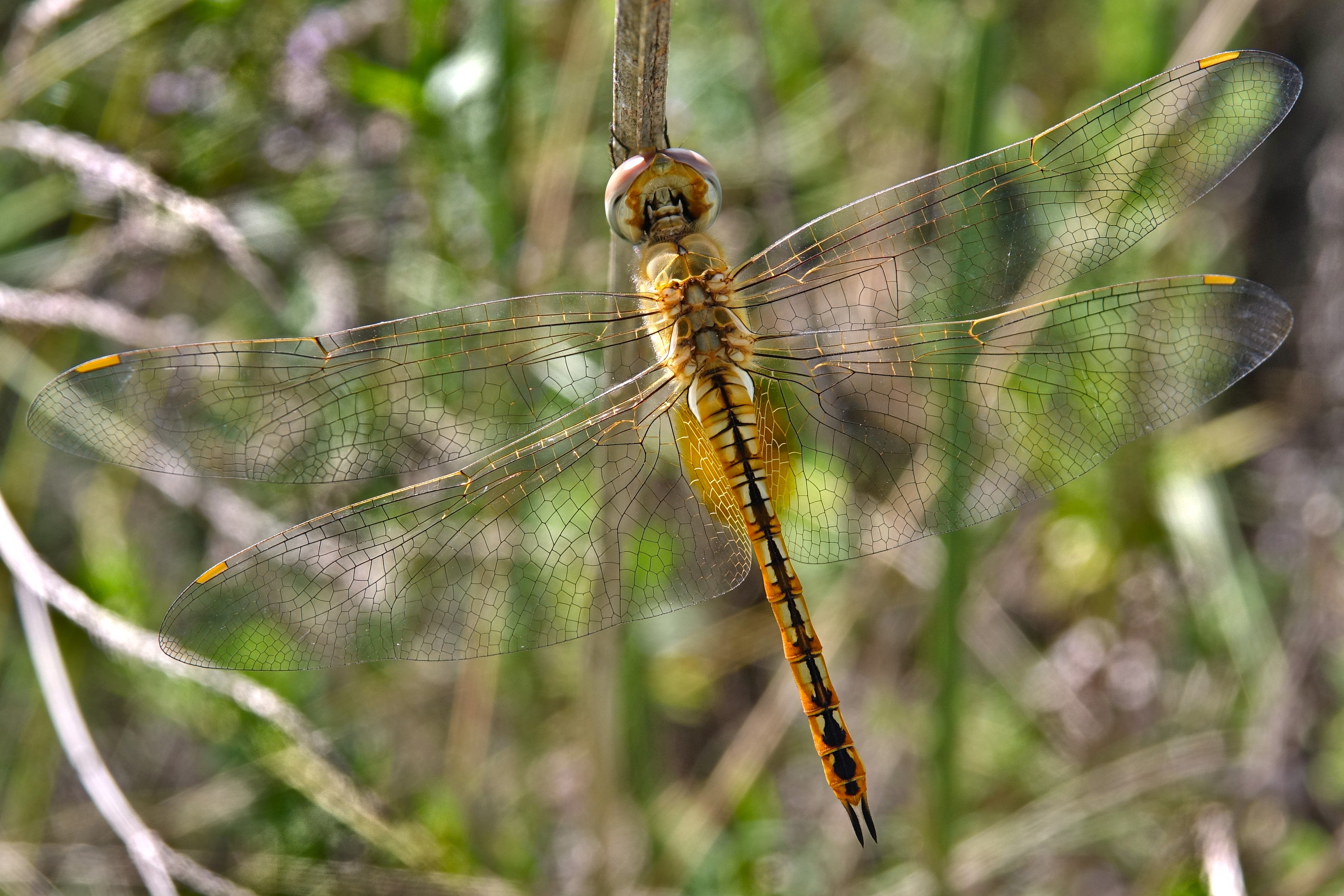 枯れ枝に止まるウスバキトンボ 日本、東海地方